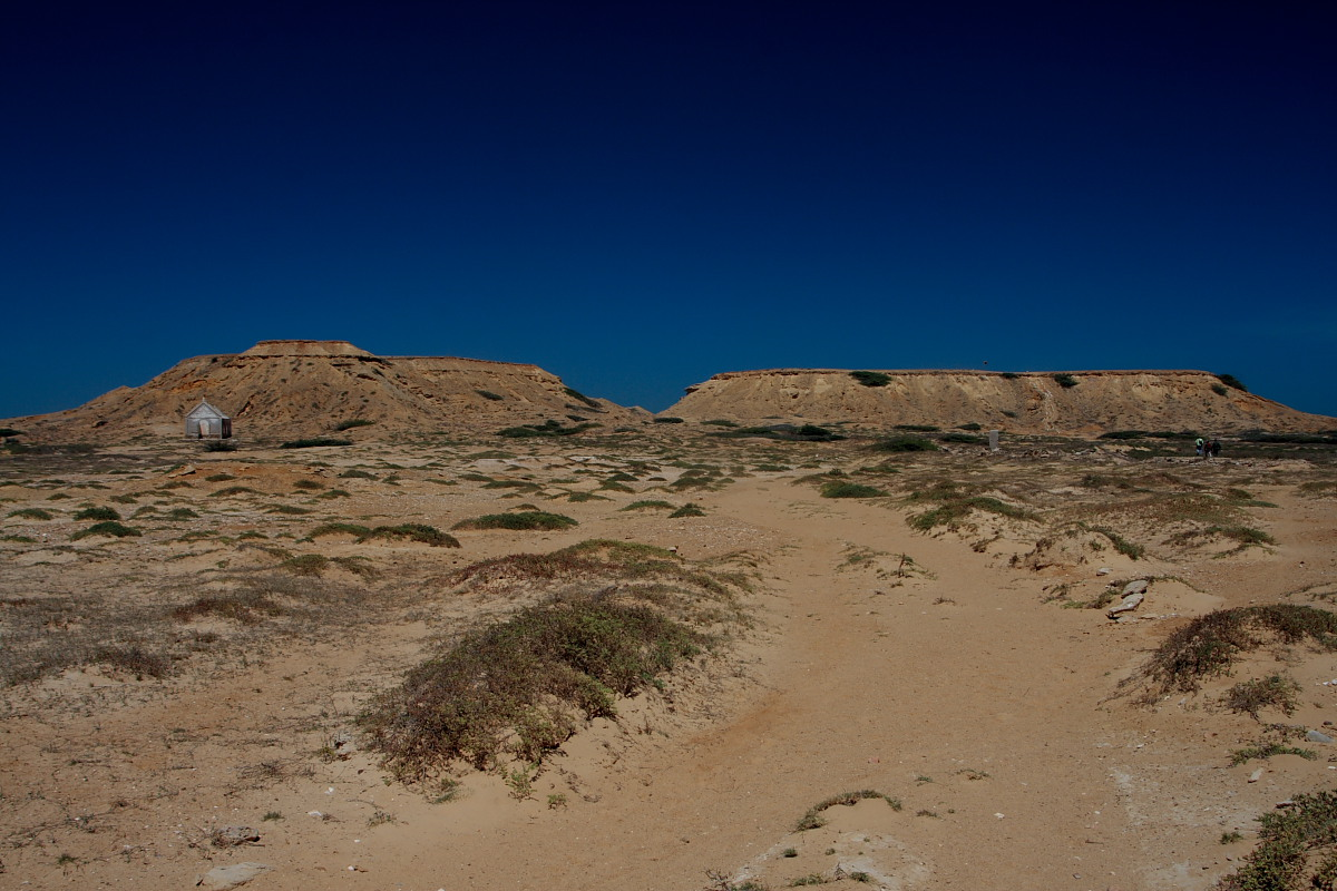 Vista de los dos morros o "castilletes" en Castilletes, del lado derecho se ve la bandera venezolana que marca el hito Nº 1.